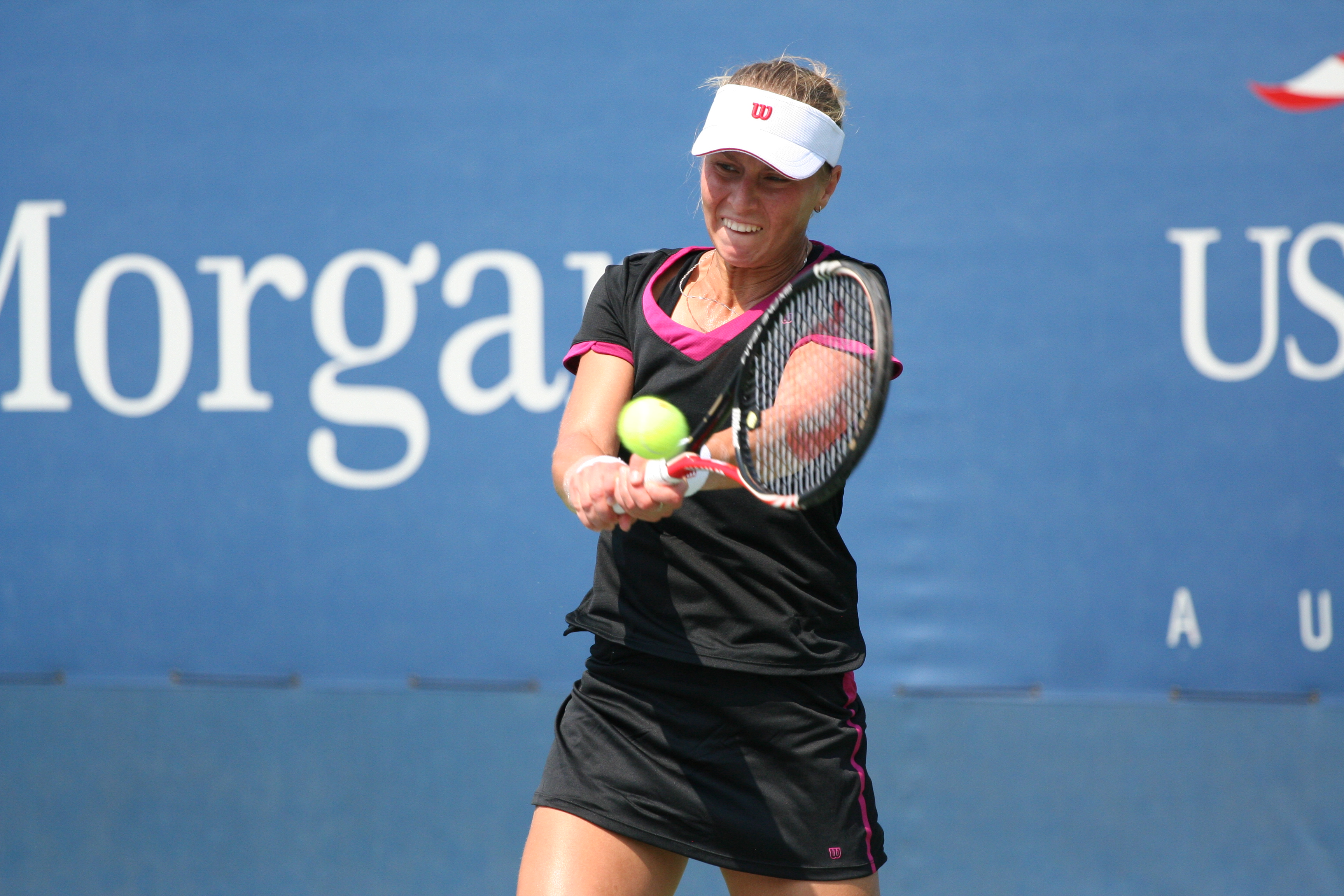 U.S. Open Sept. 1, 2010